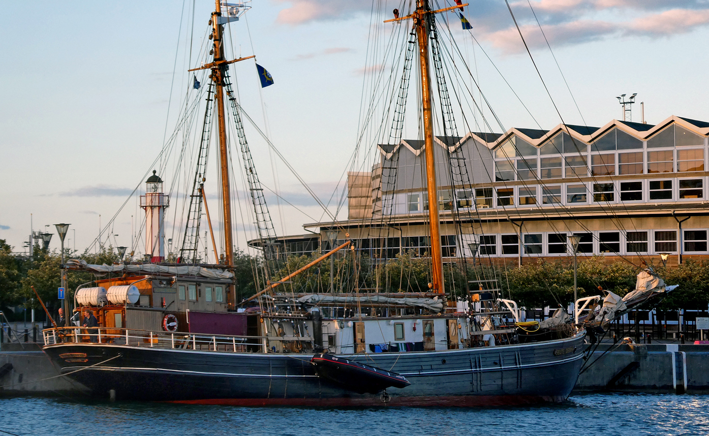 SS Seute Deern i Ystads hamn 24 juli 2020.